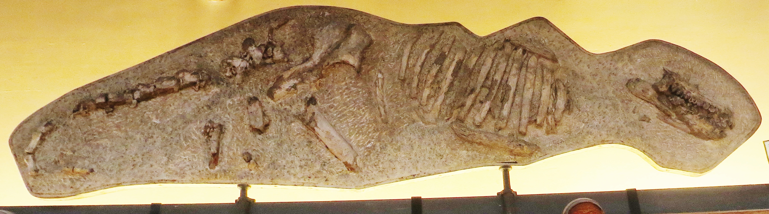 Anoplotherium fossil